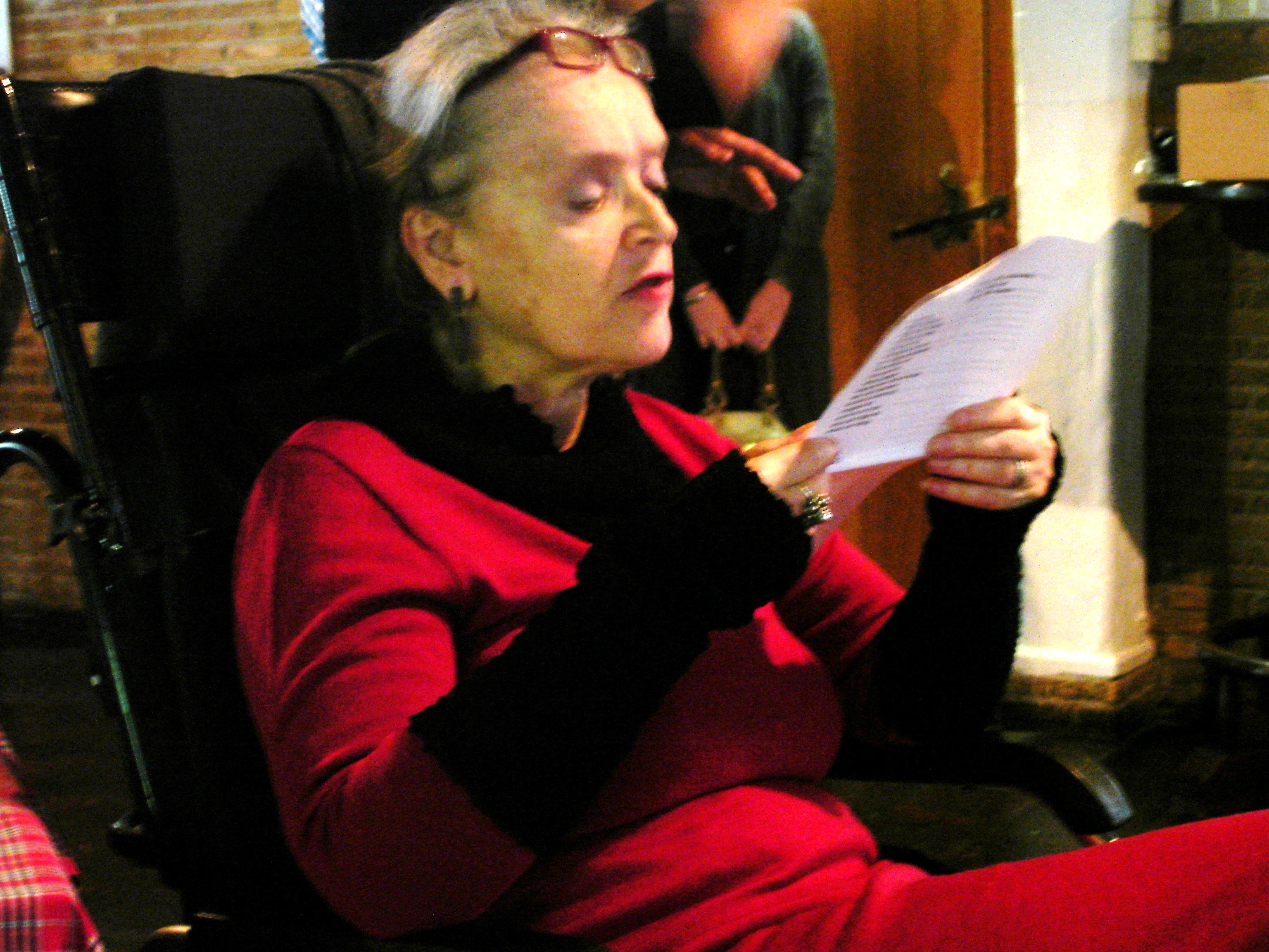 De schrijfster draagt voor op het feest van de uitgeefster, alwaar ze de trofee uitgereikt kreeg.